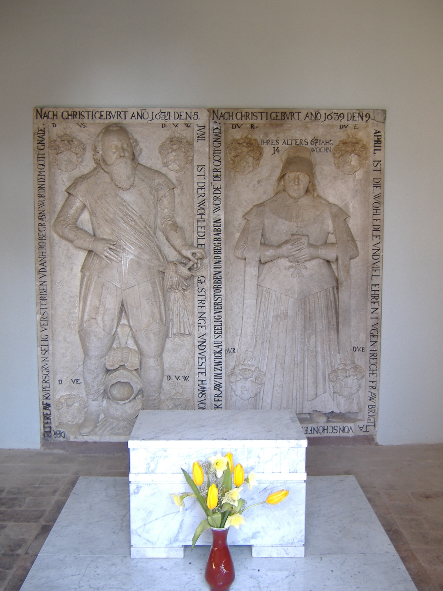 Grabstätte der Familie von Schönfels auf dem Friedhof in Ruppertsgrün (Fraureuth).